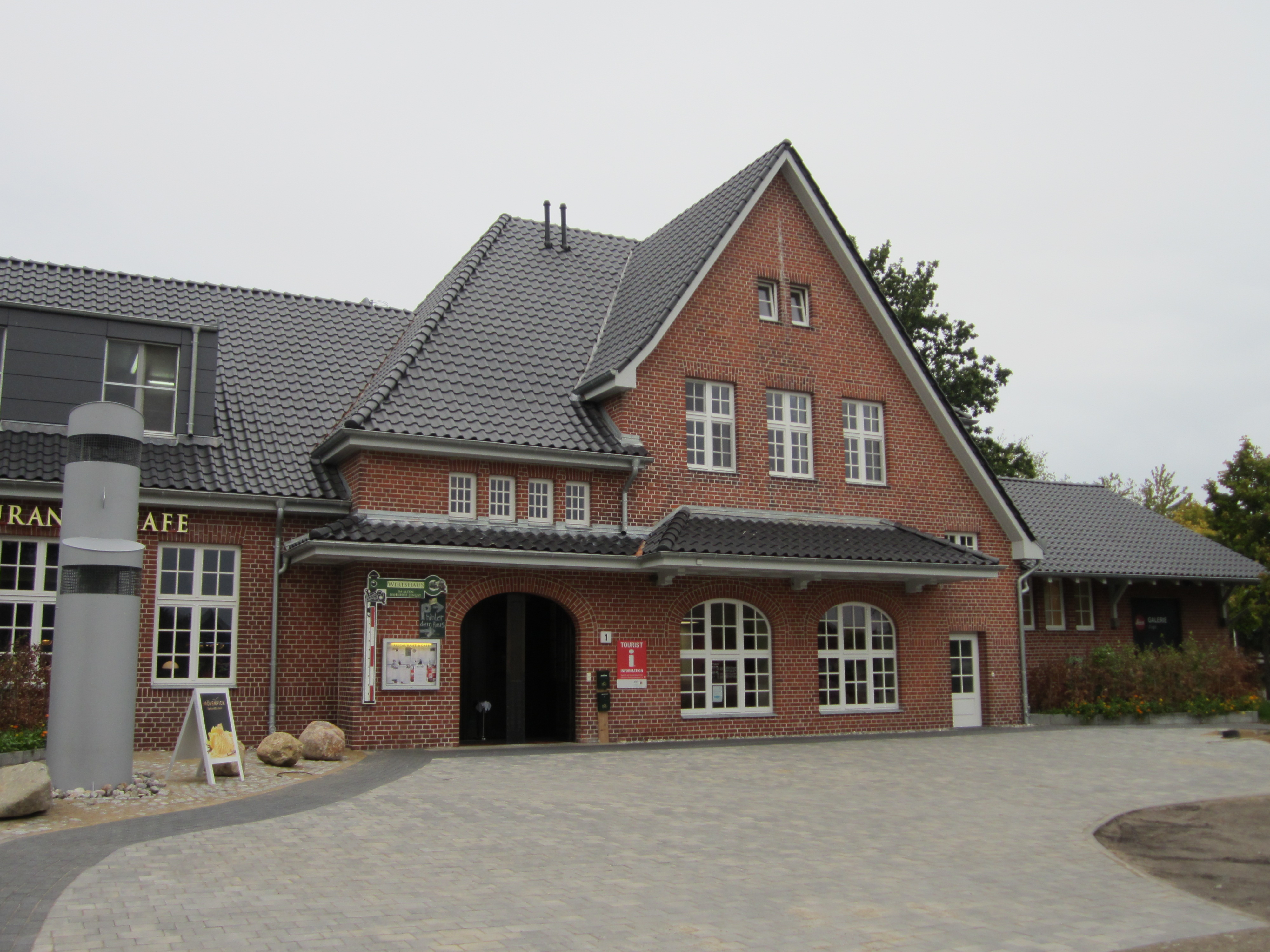 denkmalgeschütztes Gebäude in Zingst, Am Bahnhof 1